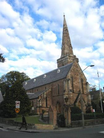 St Marks Church, Darling Point, NSW